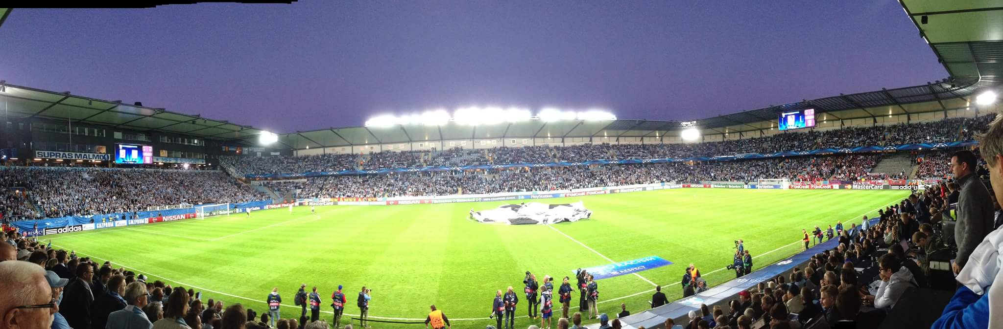 Malmö FF – Red Bull Salzburg, Uefa Champions League 2014/2015 den den 27 augusti 2014